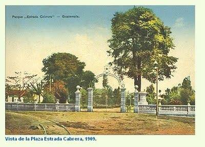 Parque Manuel Estrada Cabrera en 1909.